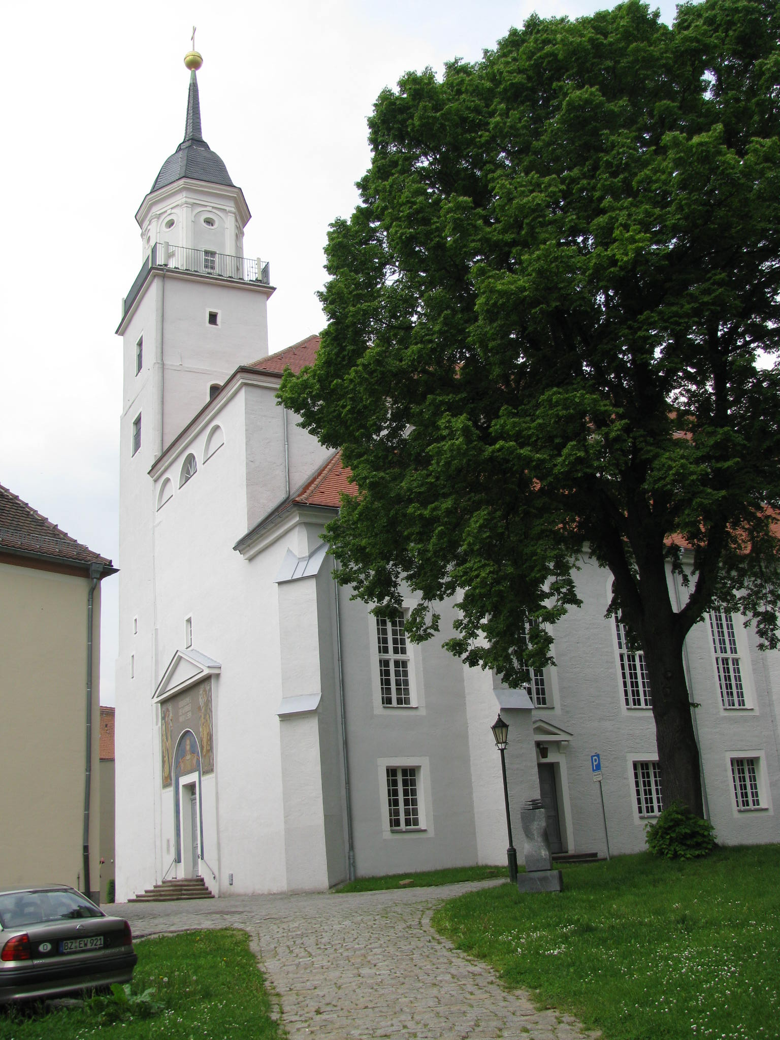 Bischofswerda